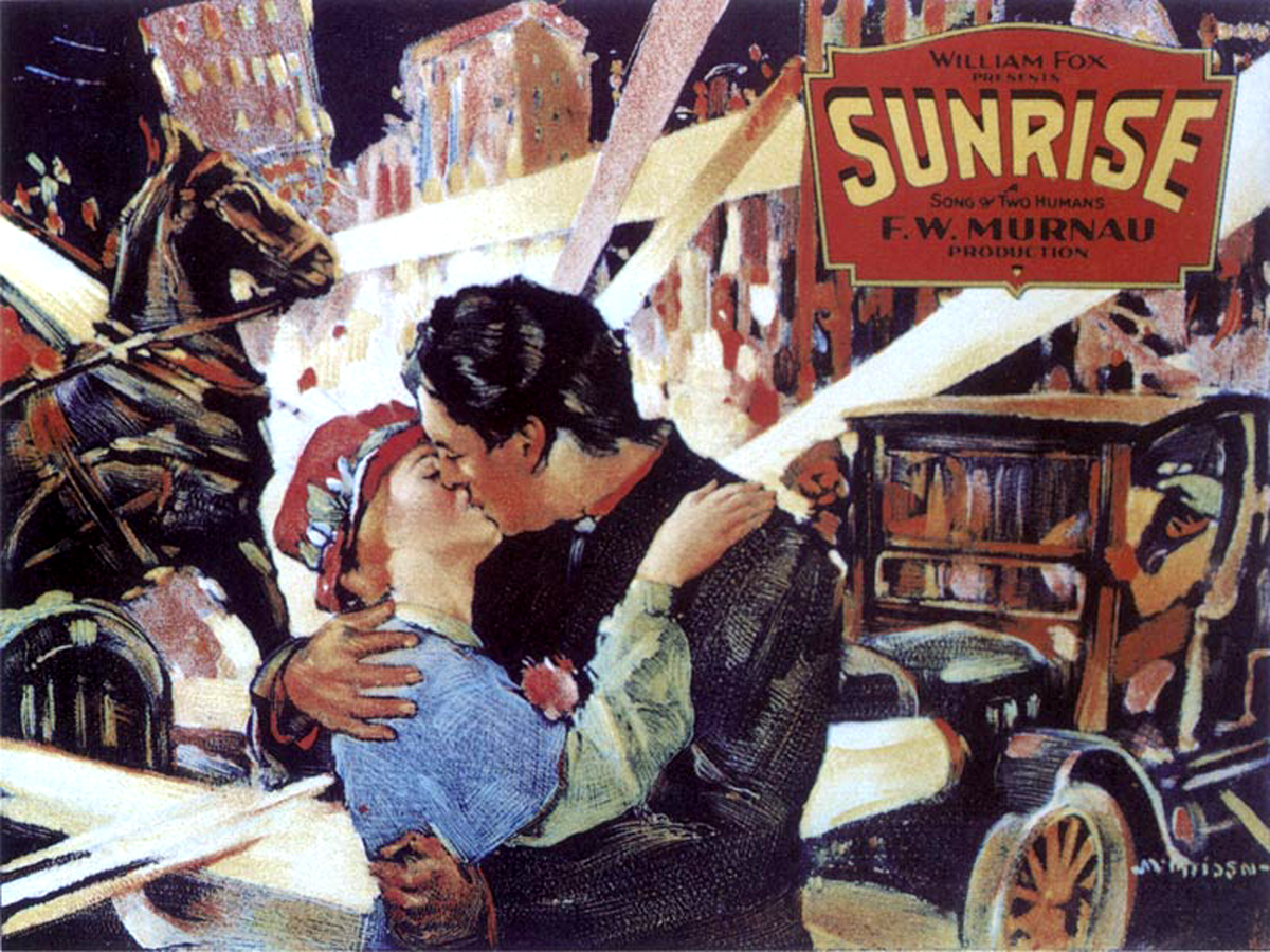 Locandina per il film di Friedrich Wilhelm Murnau "Aurora" 1927.